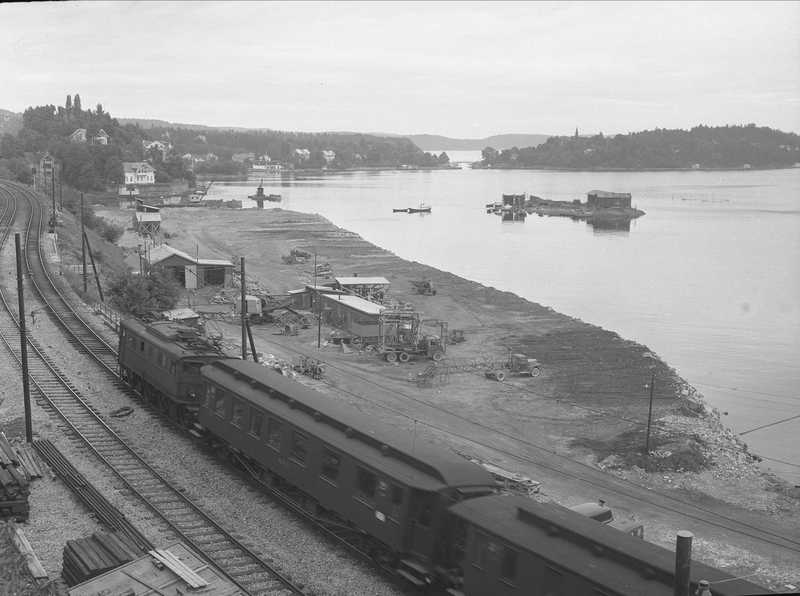 Østfoldbanen ved Bekkelaget, 1954. Kneppeskjær før byggingen av Kneppeskjærutstikkeren. Bekkelagskollen, Ormsund og Ormøya i bakgrunnen.